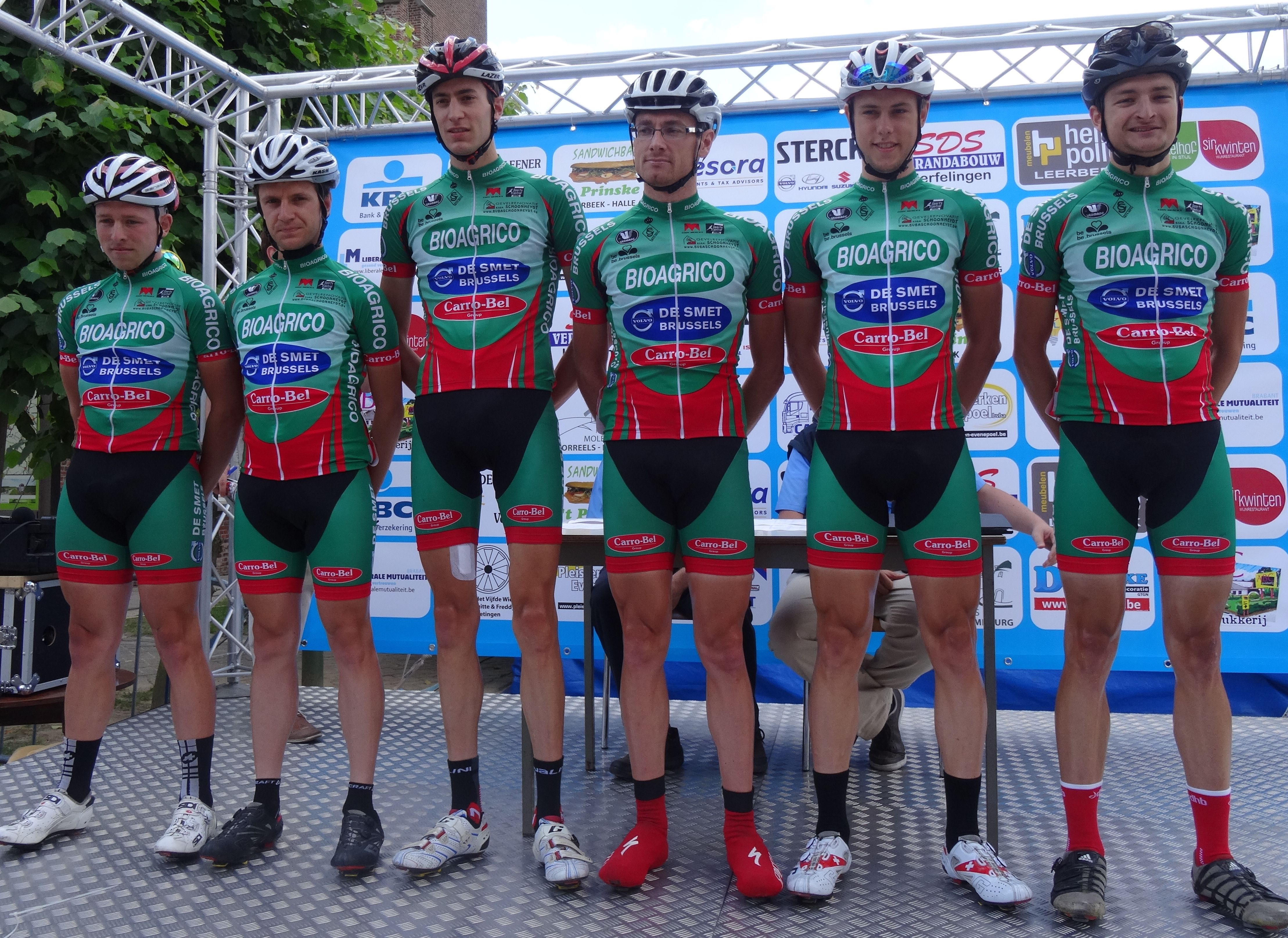 Reportage photographique réalisé le mercredi 25 juin à l'occasion du départ et de l'arrivée de l'Internationale Wielertrofee Jong Maar Moedig 2014 à Oetingen (Gooik), Belgique.